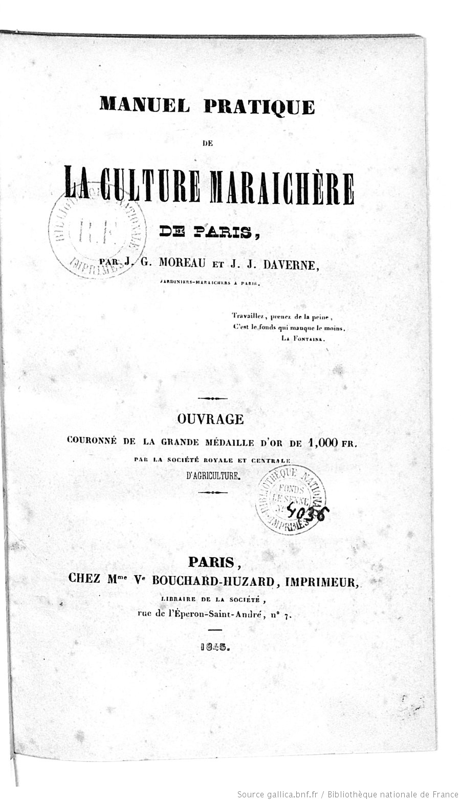 Page de couverture de l'ouvrage Manuel pratique de la culture maraîchère de Paris